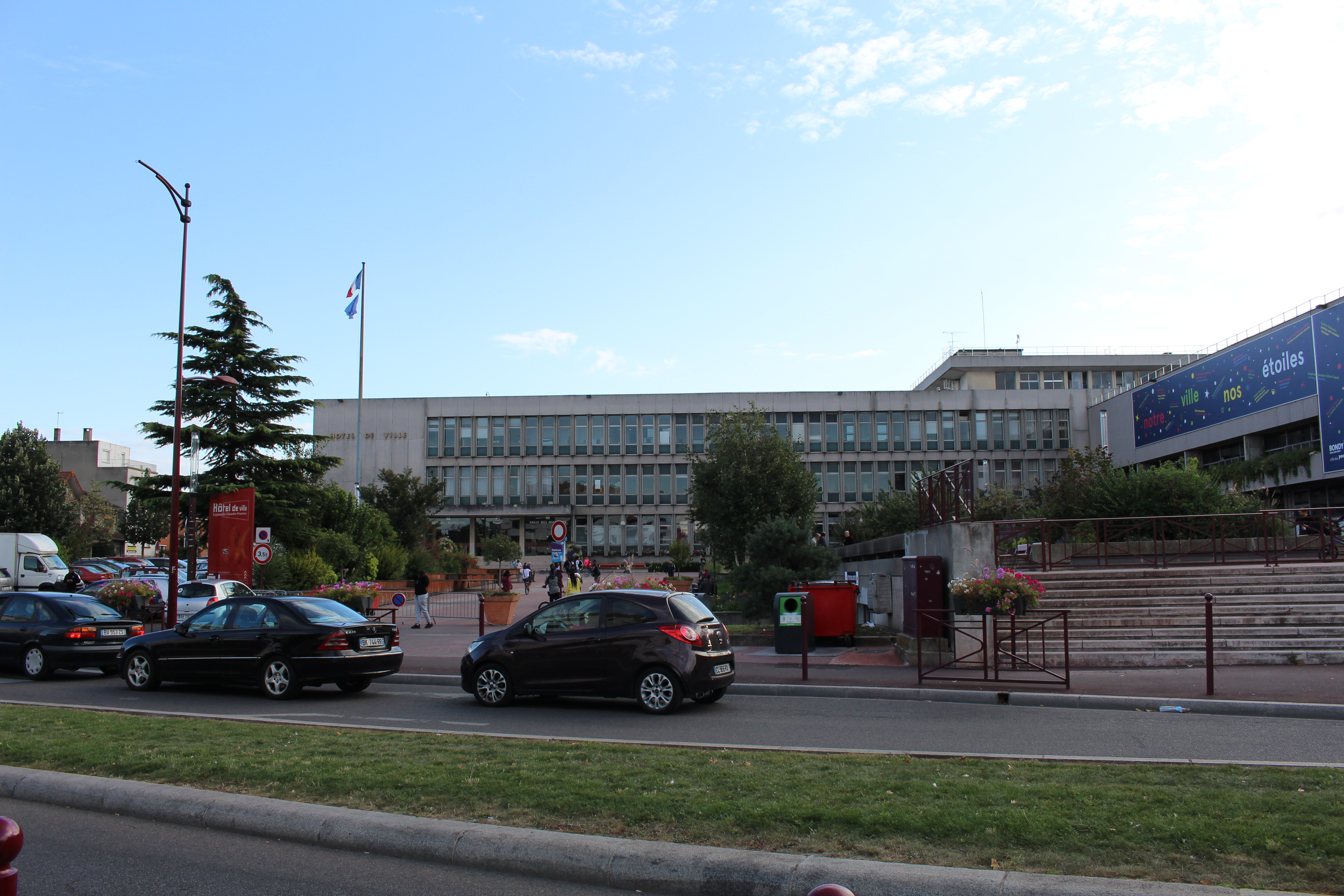 Hôtel de ville de Bondy.